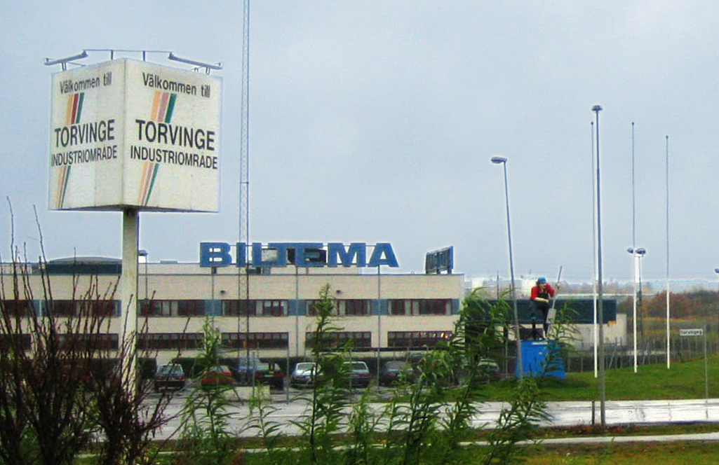 Foto på skylt vid infarten till Torvinge industriområde i Linköping. Foto taget av undertecknad, avsäger mig härmed rättigheterna till bilden. Rätat upp horisonten, tagit bort diset framför byggnaden, blåat till himlen och ökat färgmättnaden.